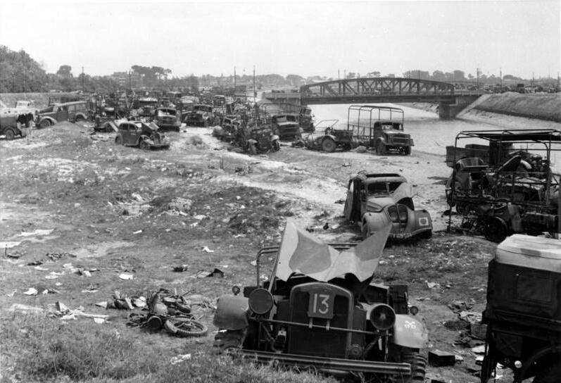 Kriegsbeute